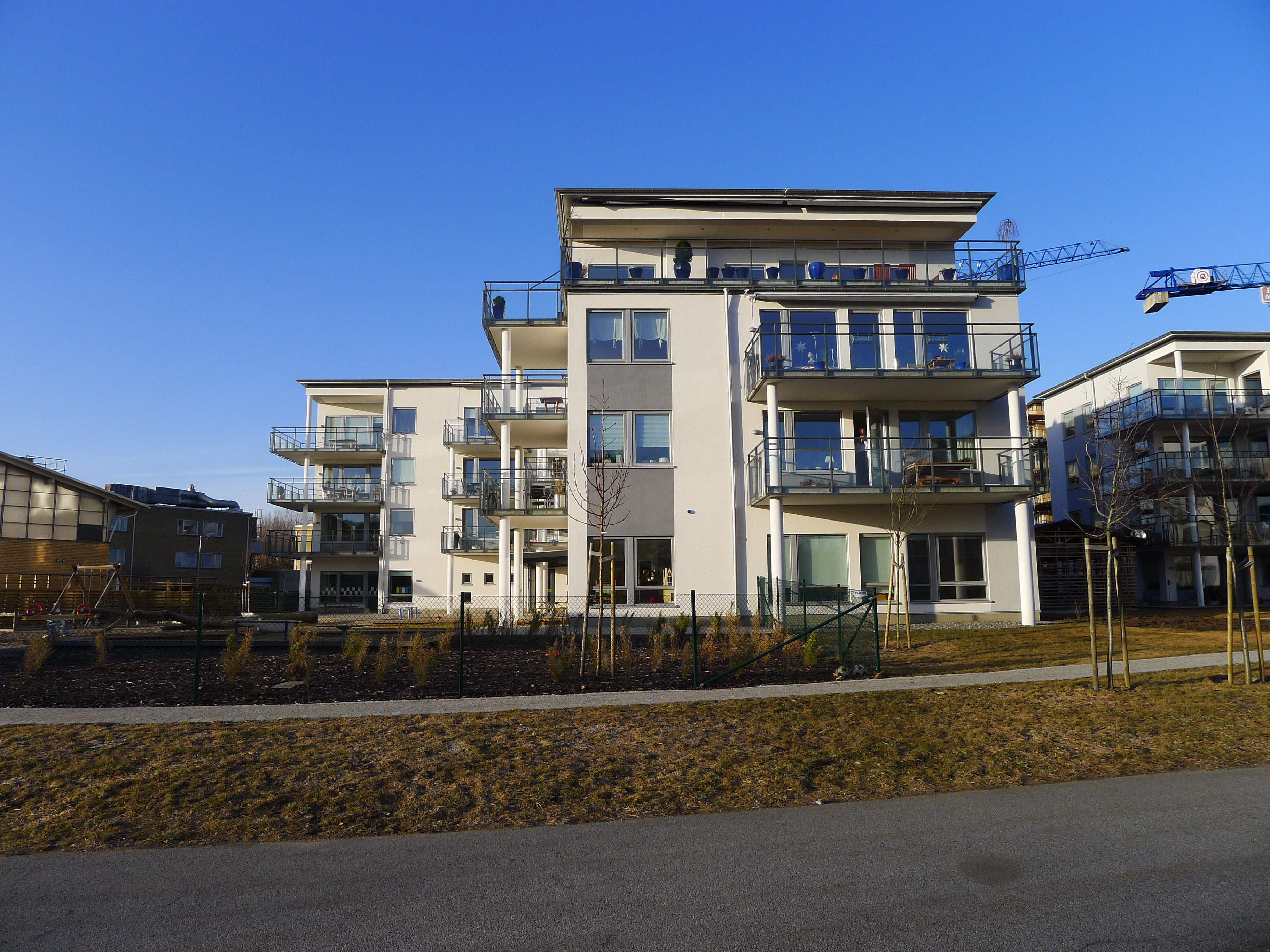 Måsen i västra Lund